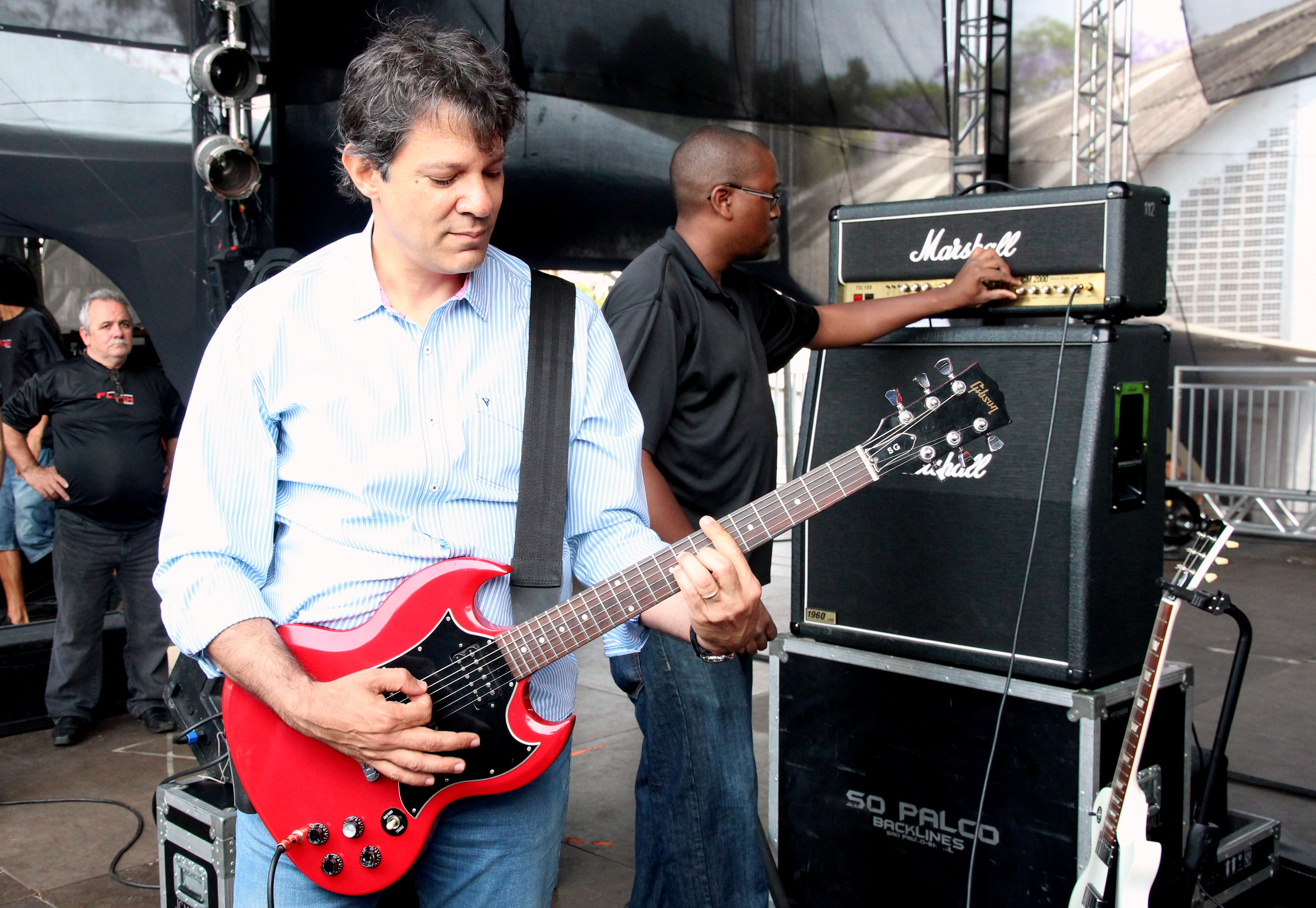 Prefeito Fernando Haddad toca guitarra em shows da banda Public Enemy